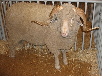 Maynesinos precoce ram